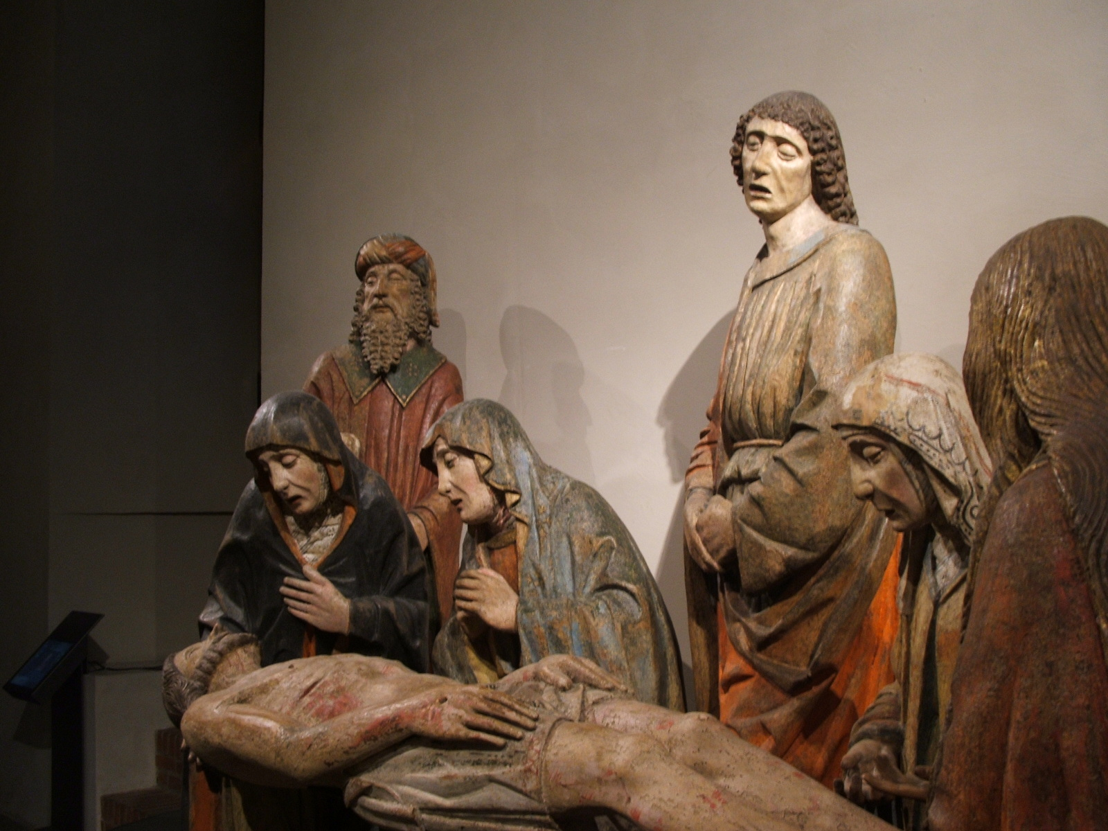 Museo Civico d'Arte Antica di Torino - gruppo ligneo "Compianto sul Cristo morto" - Domenico Merzagora (Maestro di Santa Maria Maggiore in Val Vigezzio), XV secolo